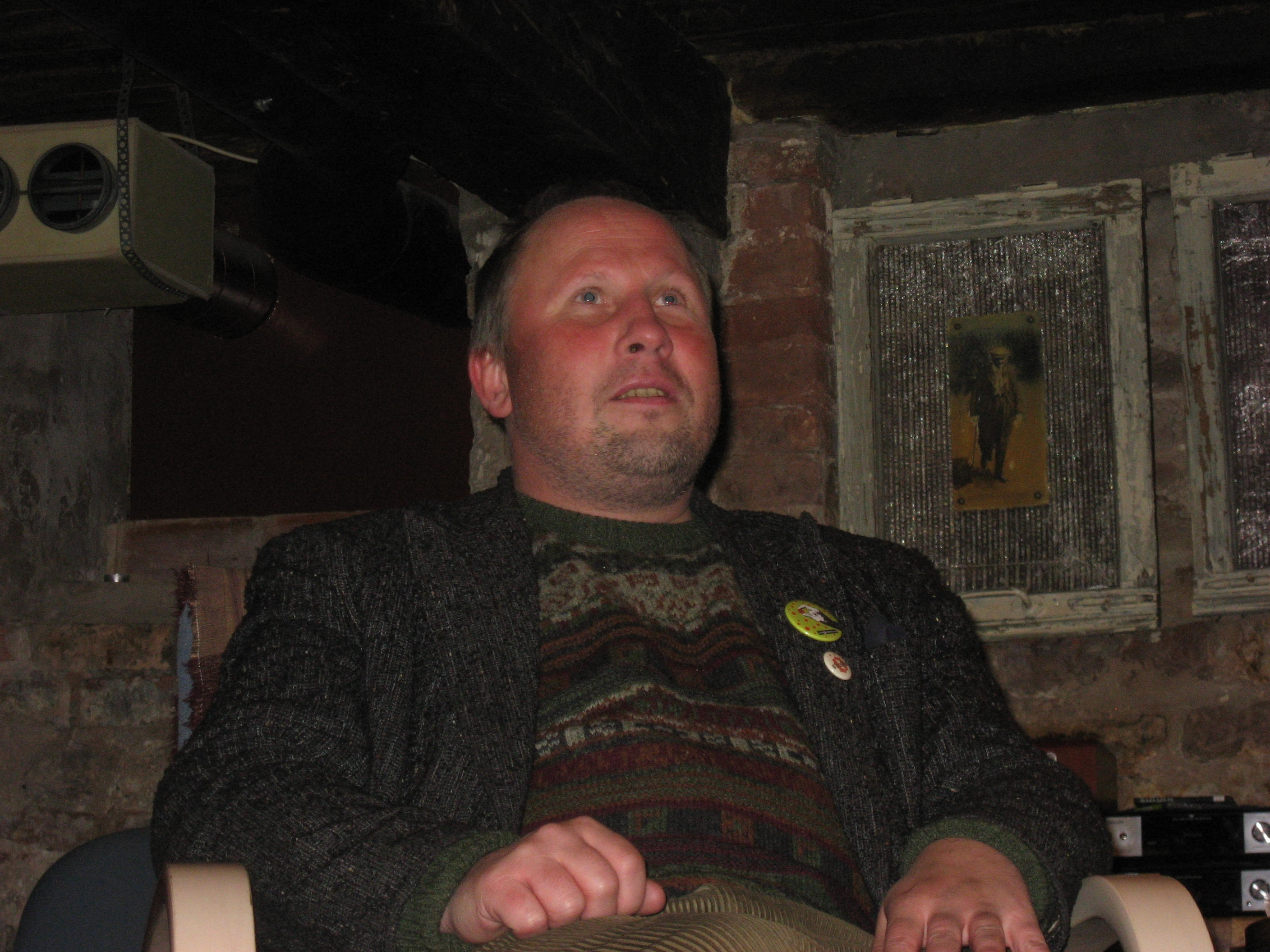 Võro: Gulgi Albert Tampere majan